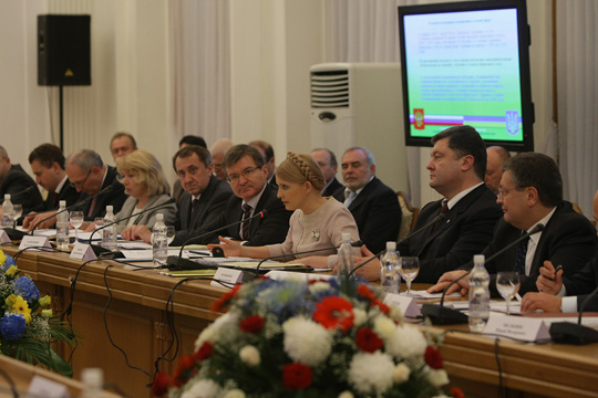 В.В.Путин принял участие в заседании Комитета по вопросам экономического сотрудничества Российско-Украинской межгосударственной комиссии